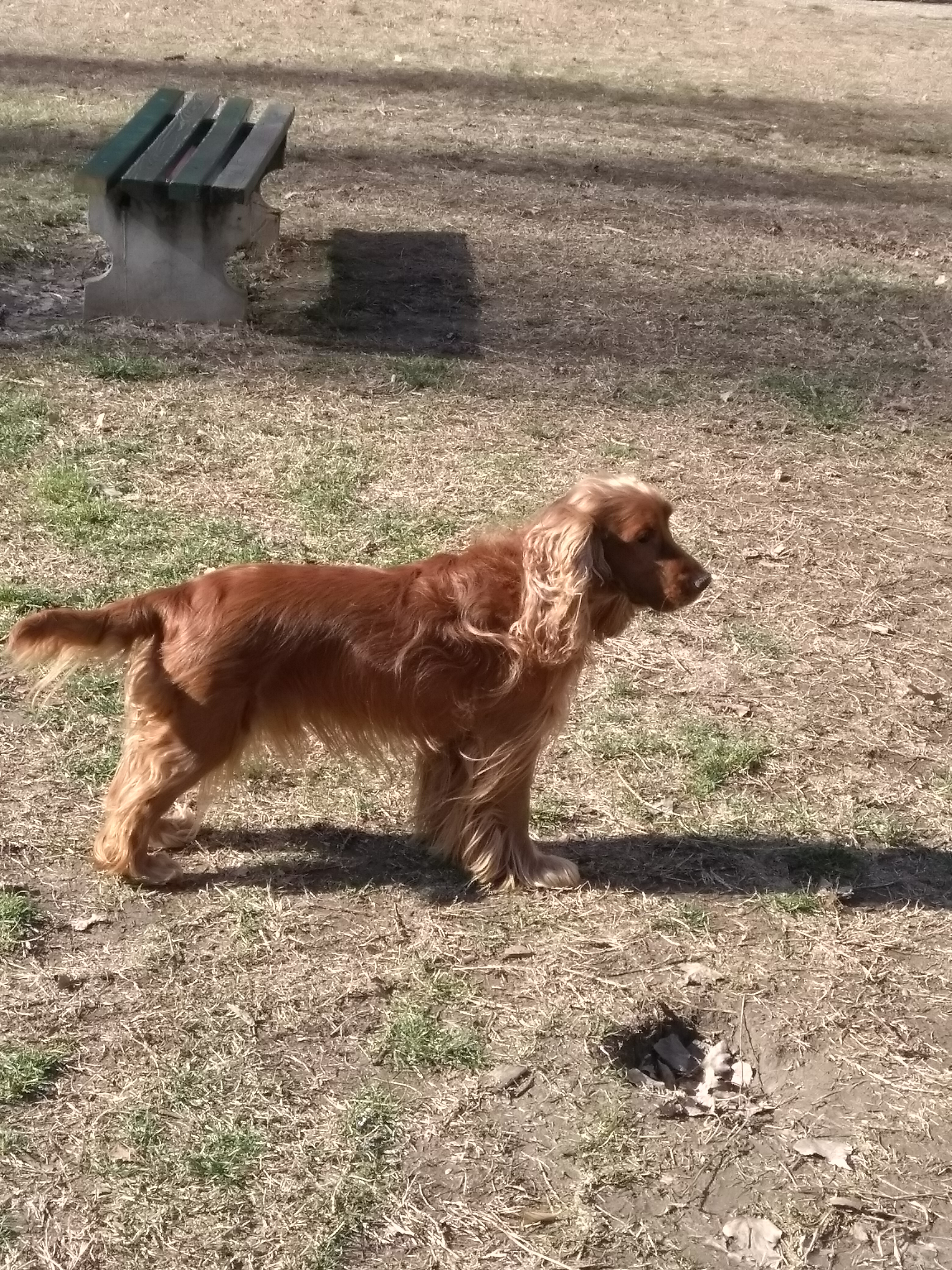 Кокер изглед одраслог негованог пса